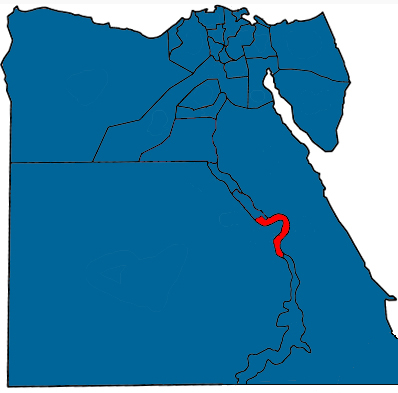 مصرى: قنا.